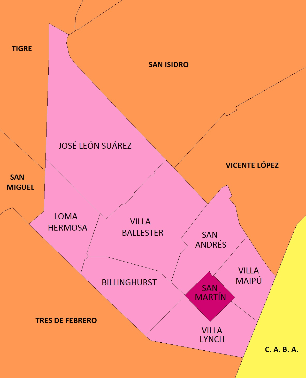 Mapa de la distribución territorial del Partido de General San Martín.